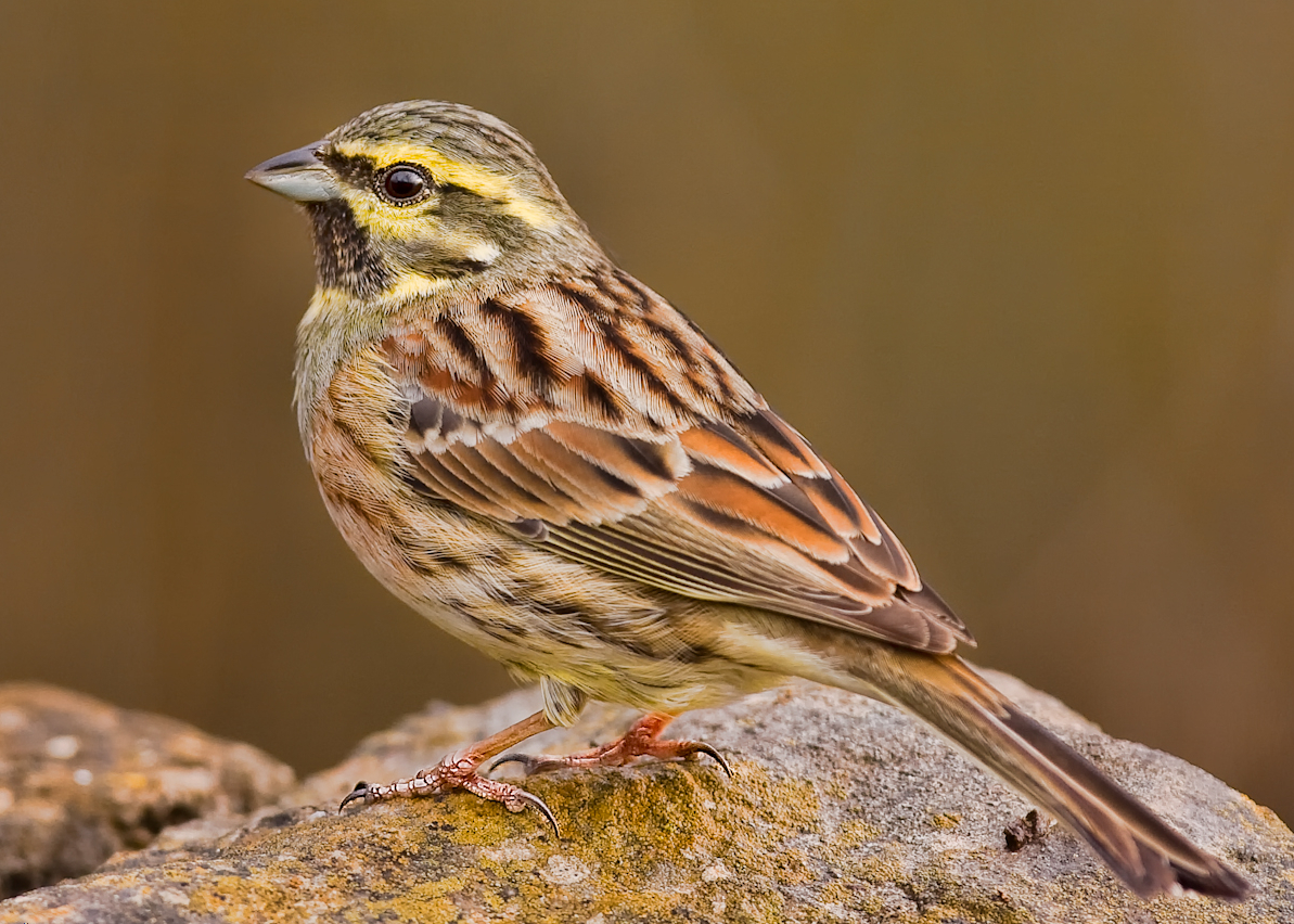 Male Cirl Bunting, Emberiza cirlus, Ayódar, Valencia, Spain